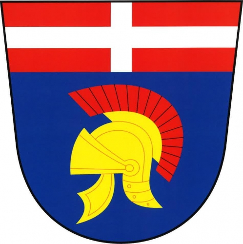 Znak,Lavičné , okres Svitavy